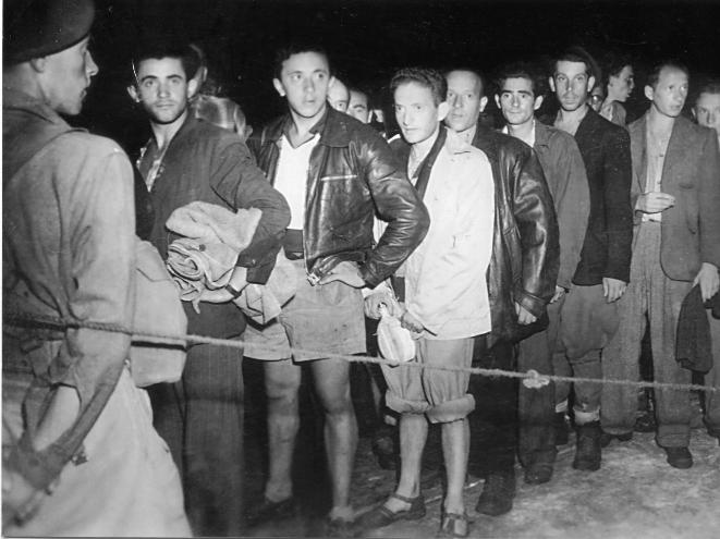 אוניית המעפילים אף על פי כן - מעפילים מועברים לאוניית גירוש למחנות סגורים בקפריסין